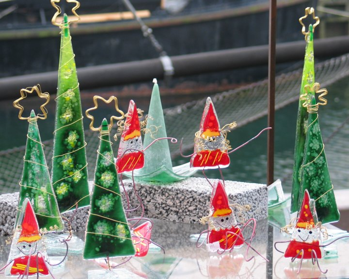 Juledekoration. Set ved julemarkedet i Nyhavn, december 2004